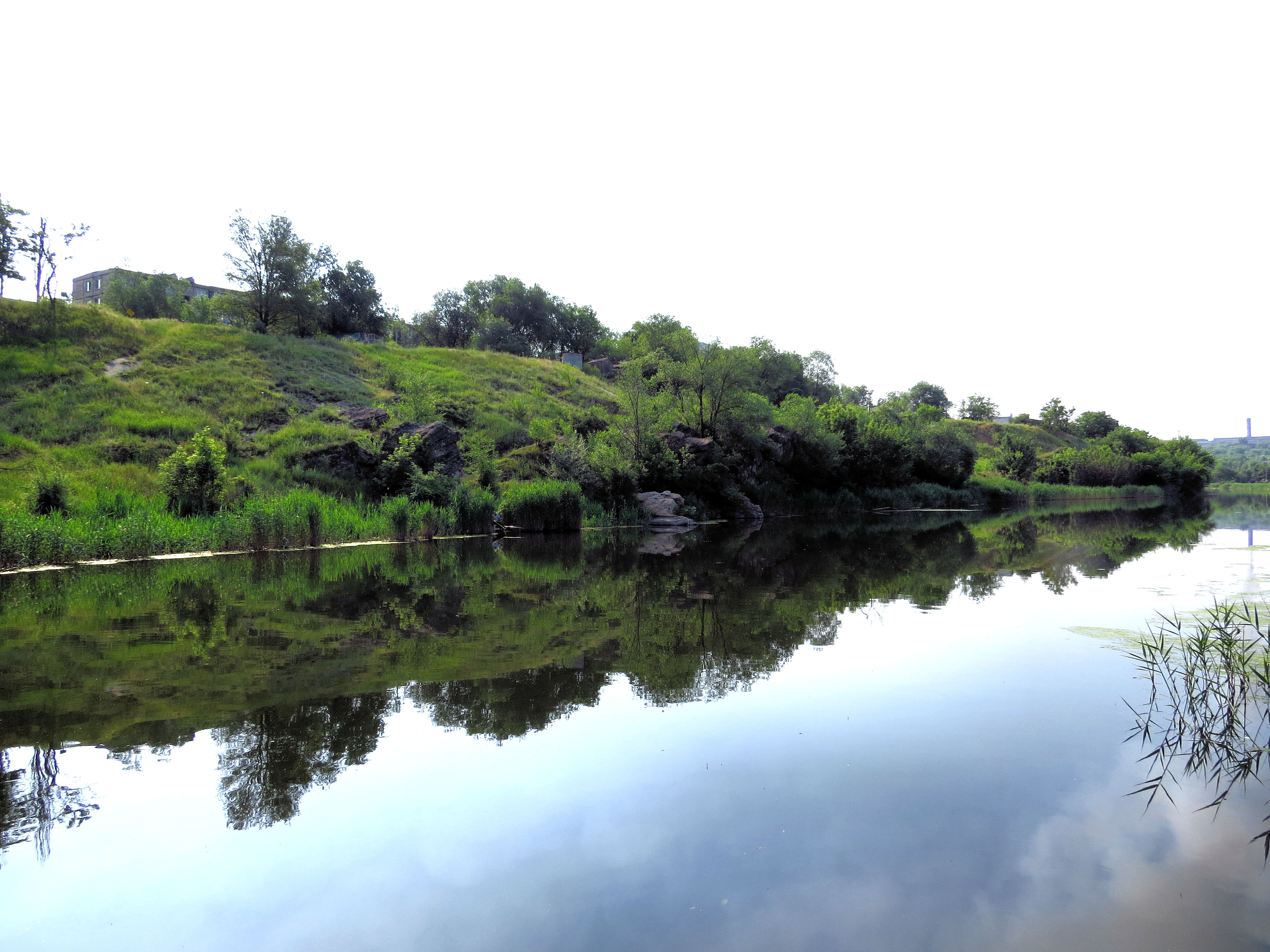 м. Кривий Ріг, Селище Південного ГЗК, лівий берег р. Інгулець. ВАТ «Південний ГЗК»